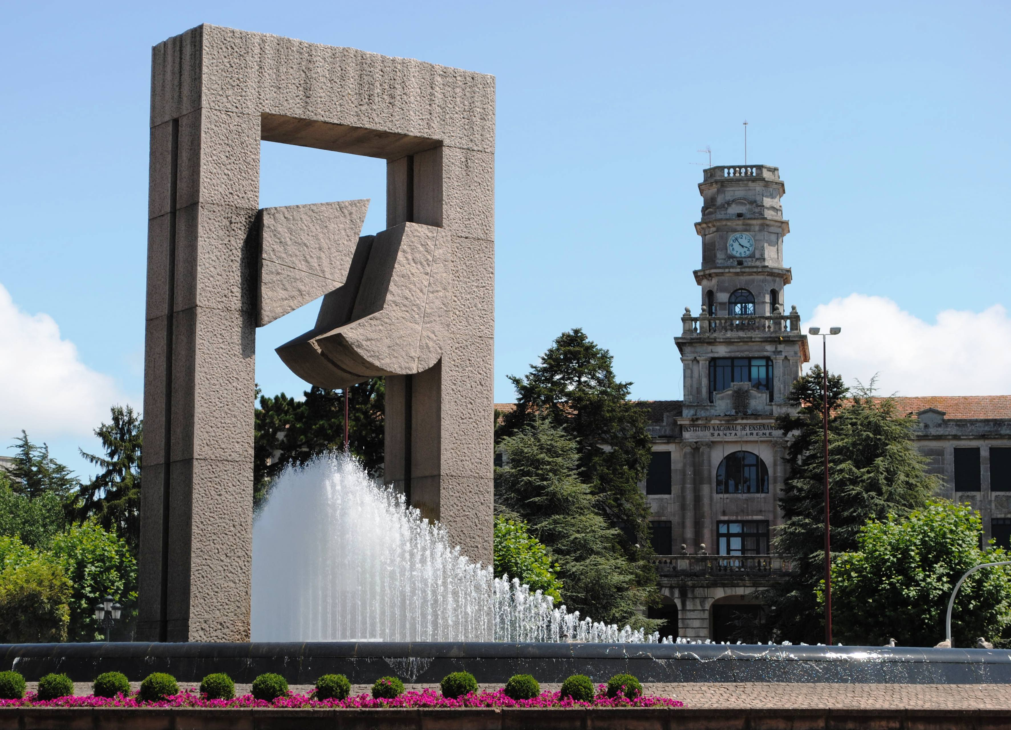 Vexa o título e as categorías.